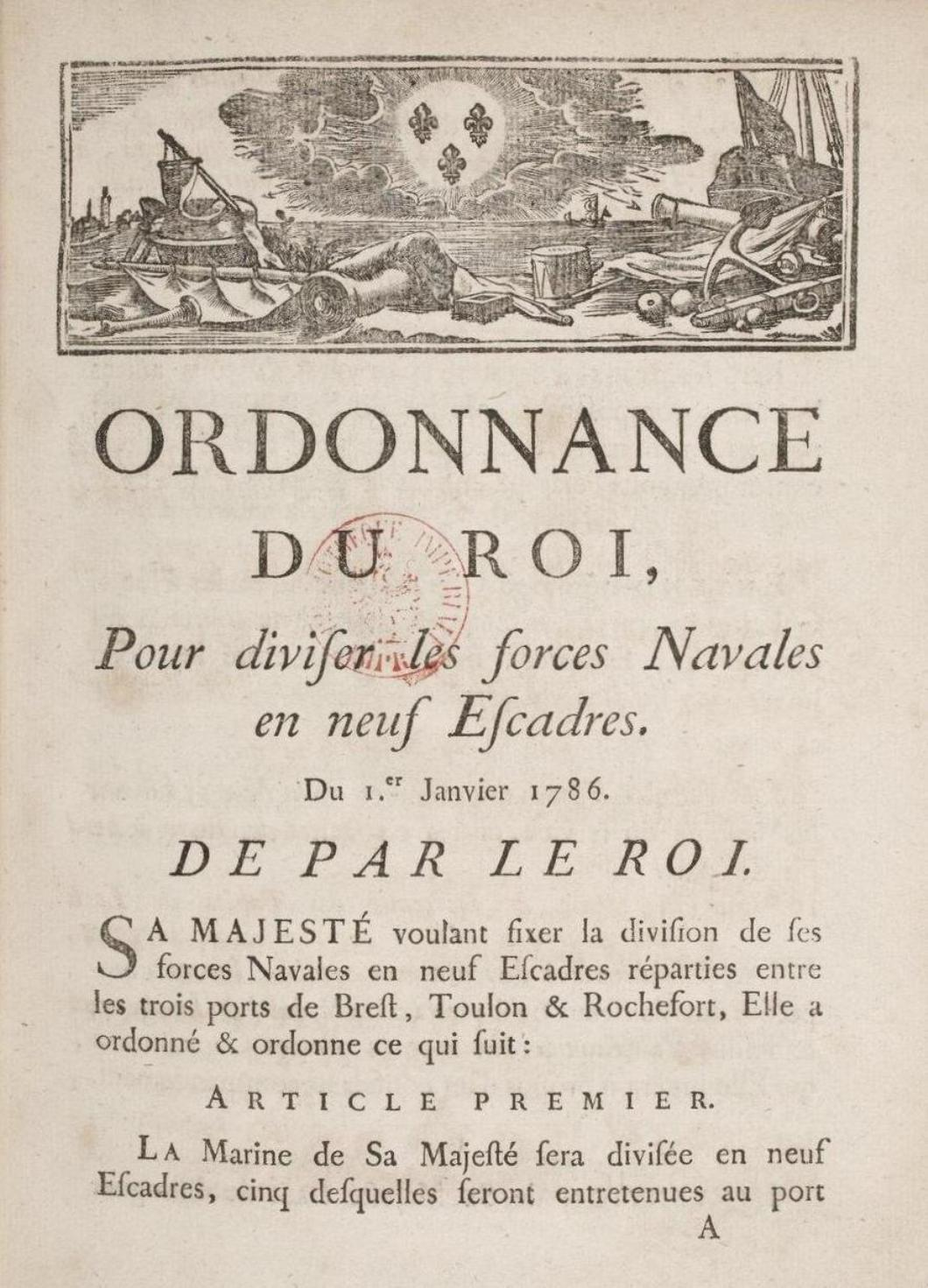 Première page de l'ordonnance royale du 1er janvier 1786 qui réorganise la flotte française en neuf escadres. Promulguée par le ministre de la Marine de Castries.